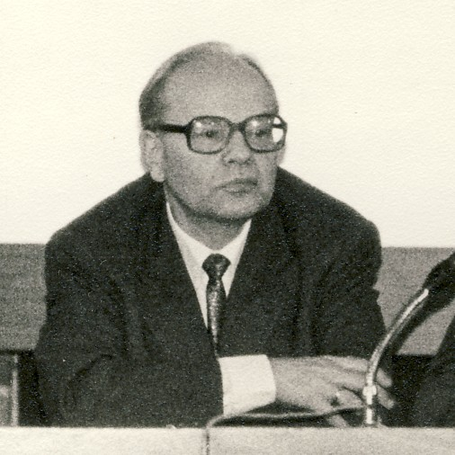 Porträt Carl Ordnung 1987 während der Jahrestagung der CFK in der DDR in der Stephanus-Stiftung Berlin-Weißensee.